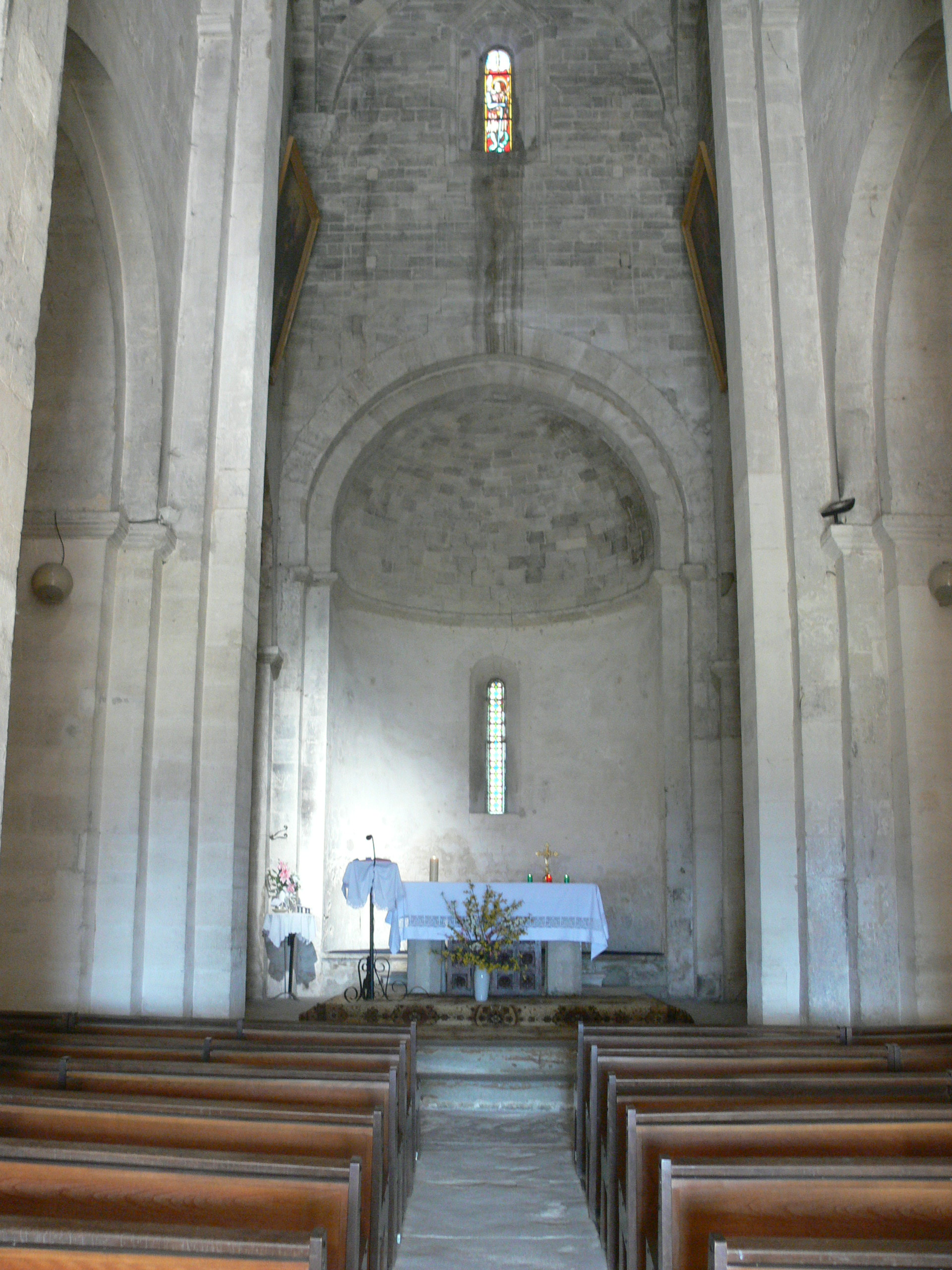 La Garde-Adhémar - église Saint-Michel